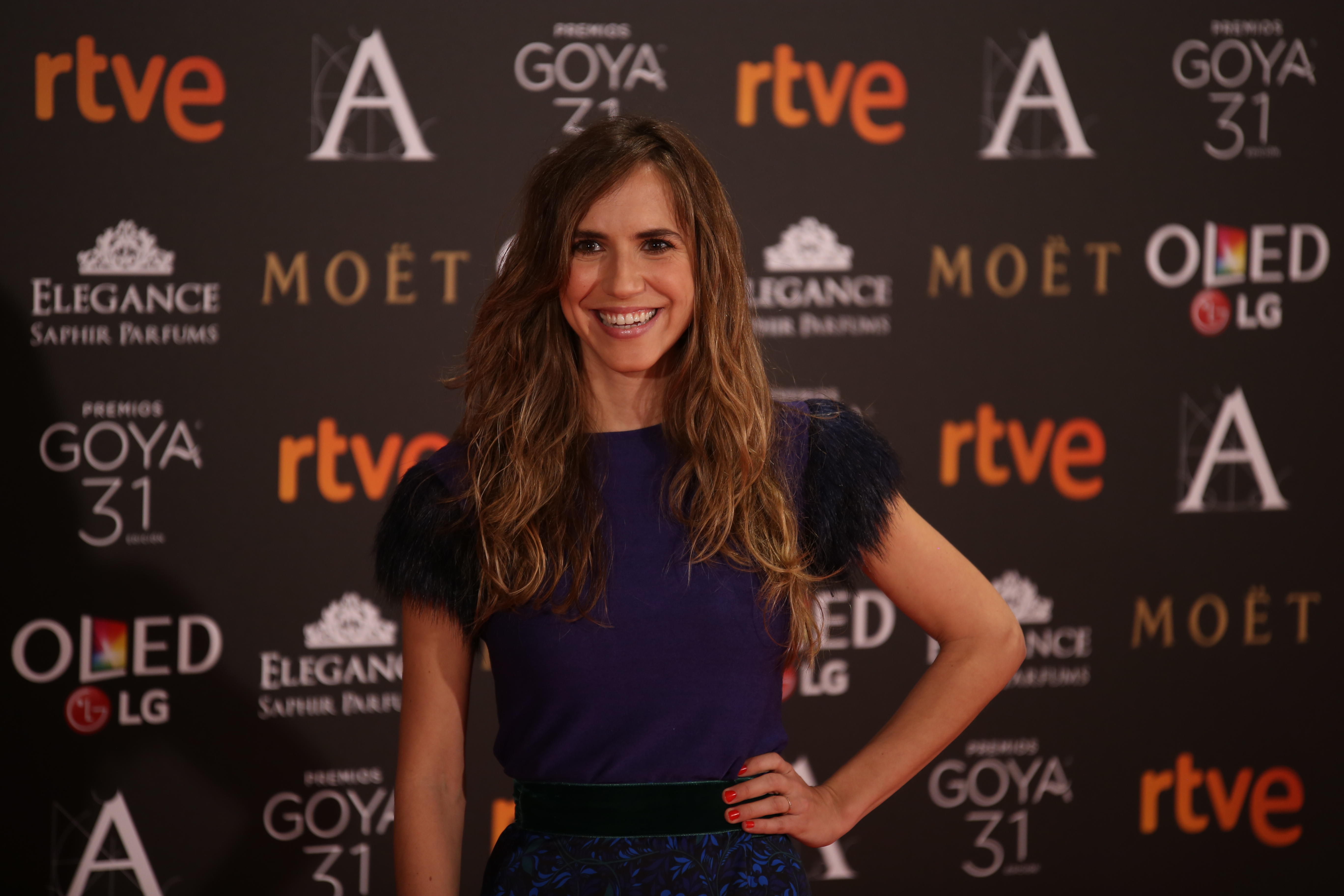 Premios Goya 2017